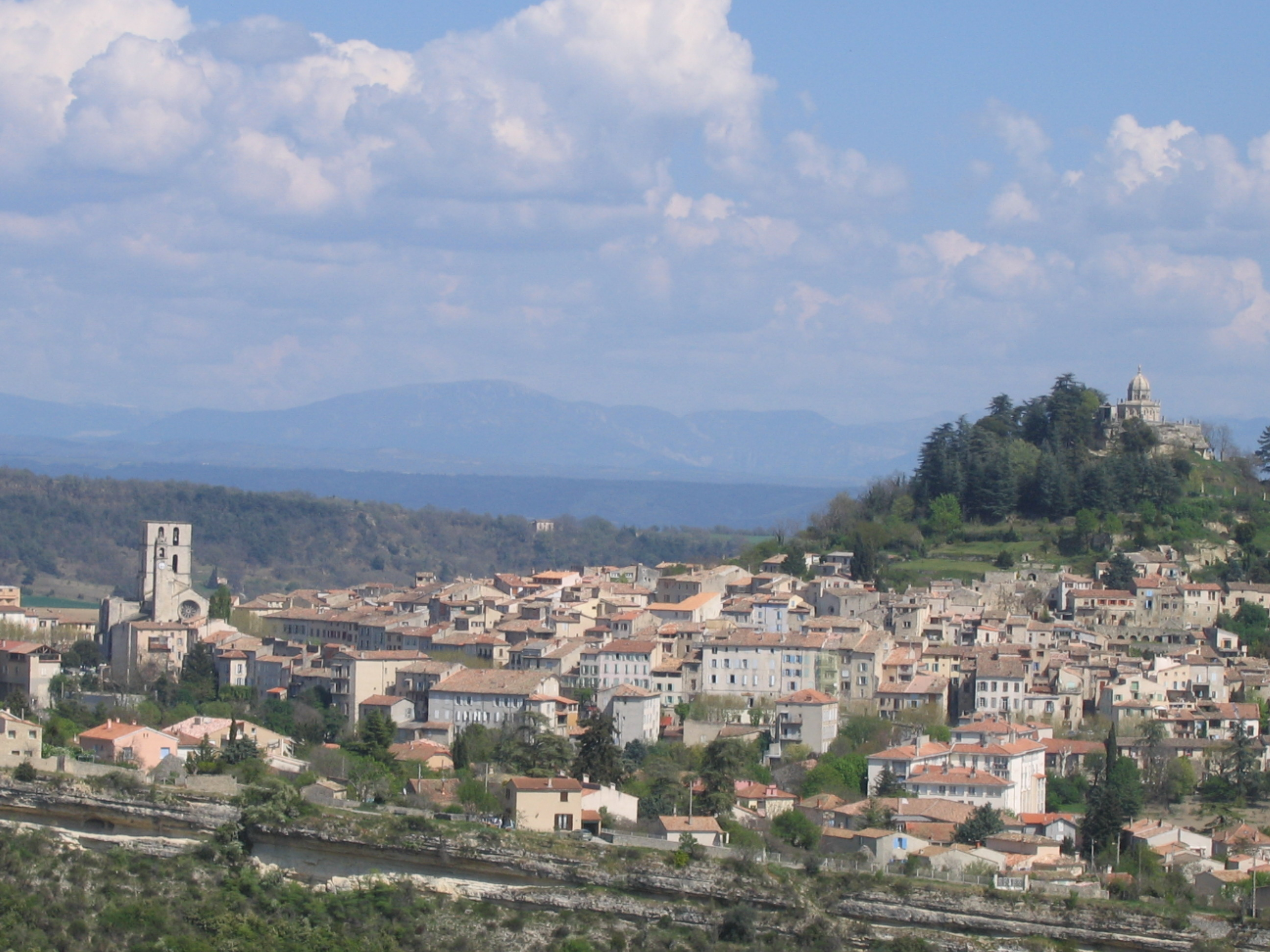 Vue sur Forcalquier